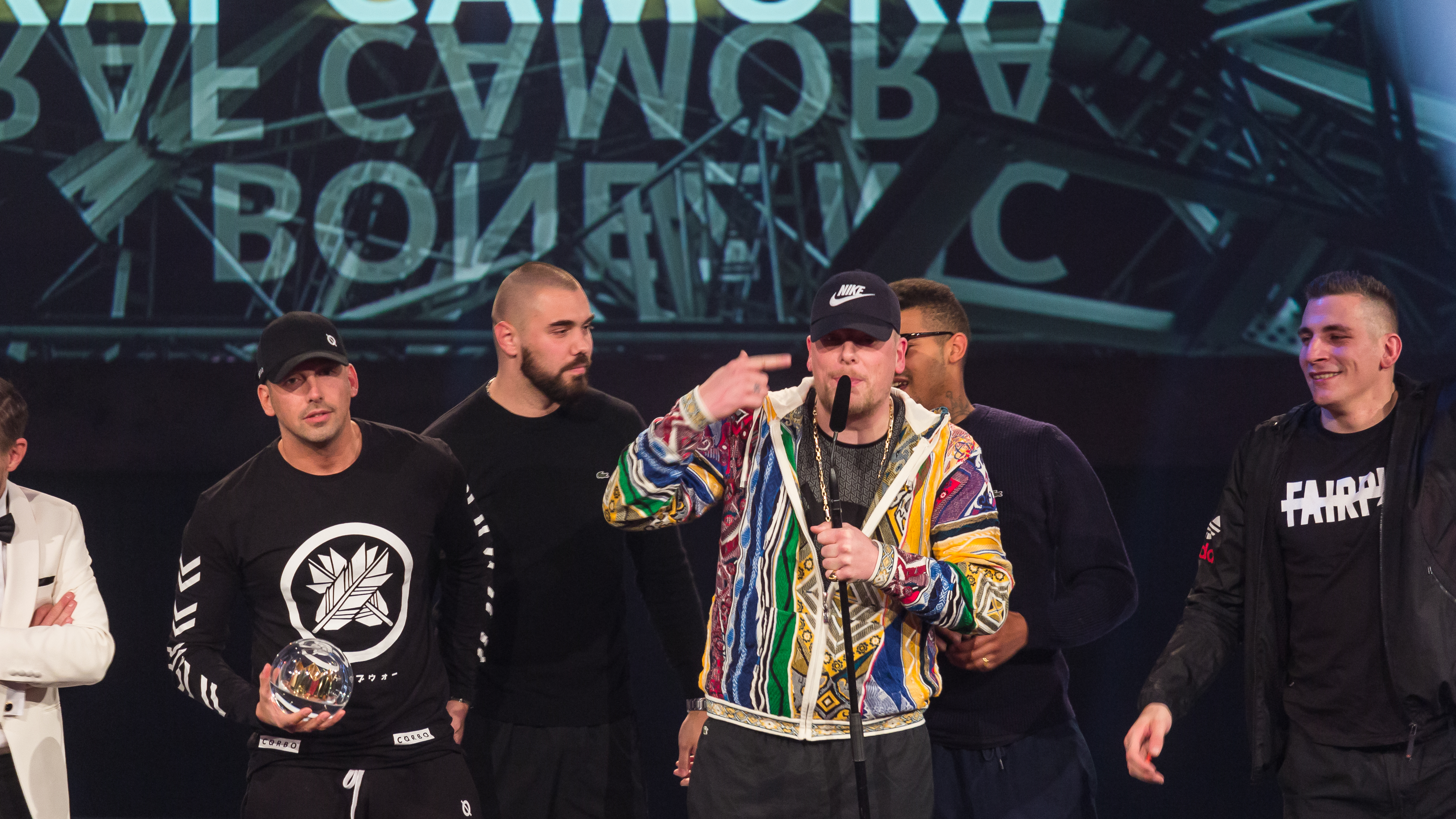 1LIVE Krone 2016 - 2015 - Show - Bester Hip-Hop-Act: Bonez MC & RAF Camora